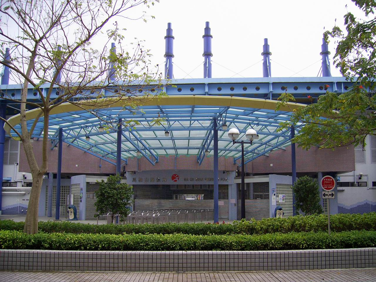 馬鞍山游泳池入口